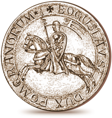 Pieczęć Bogusława II. Szczecin, 1214 (?)